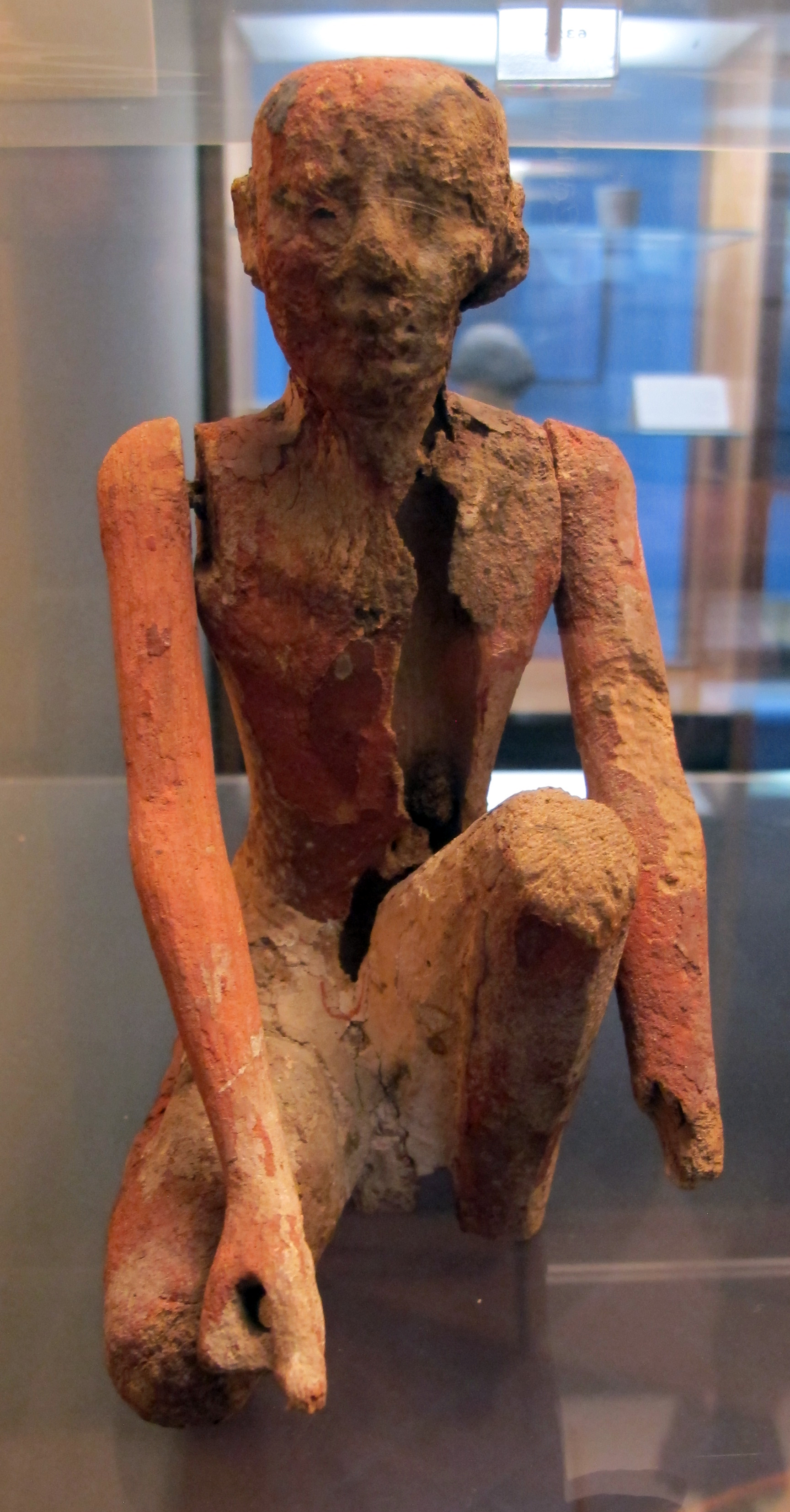 Ancient Egyptian art in the Museo archeologico nazionale (Florence)